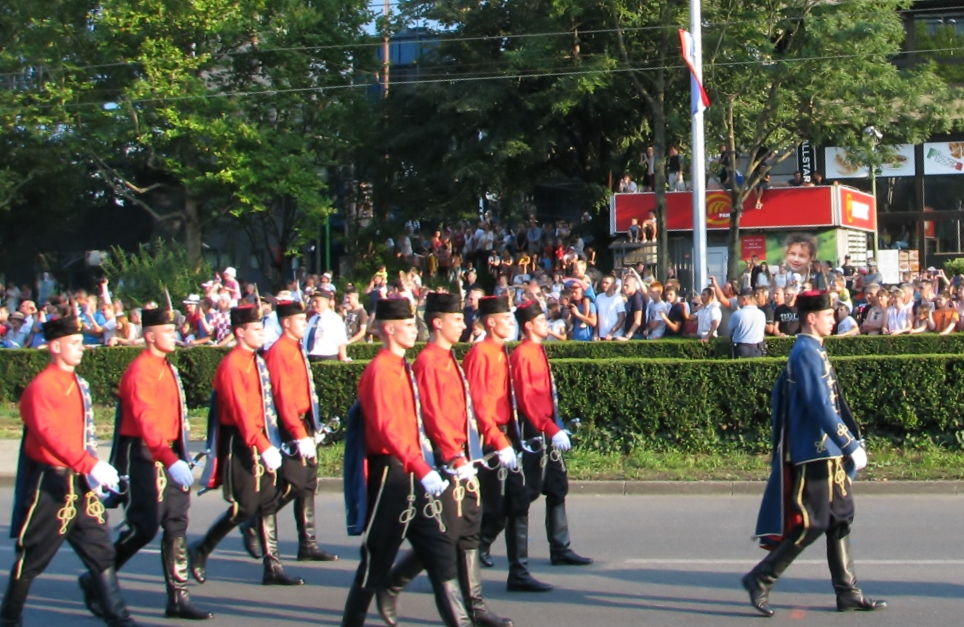 Počasna sokolska garda Osijek na svečanom mimohodu u Zagrebu, 4. kolovoza 2015.